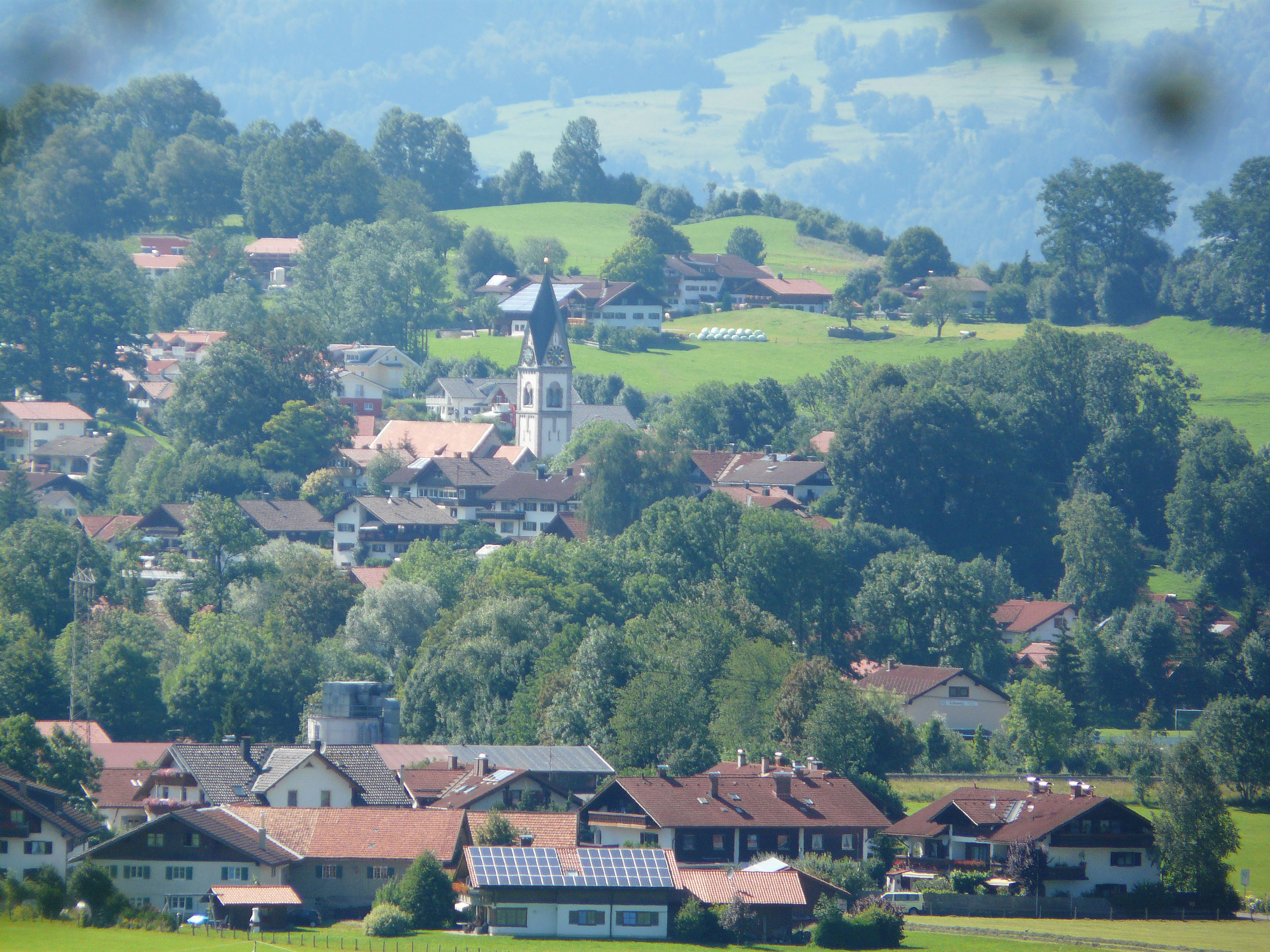 Blaichach von Osten